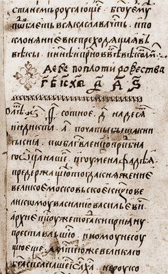 «Златоструй» и Торжественный минейный. Сентябрь - январь. Ок. 1461 г. (РГАДА. Ф. 196. On. 1. N 1679. Л. 227).